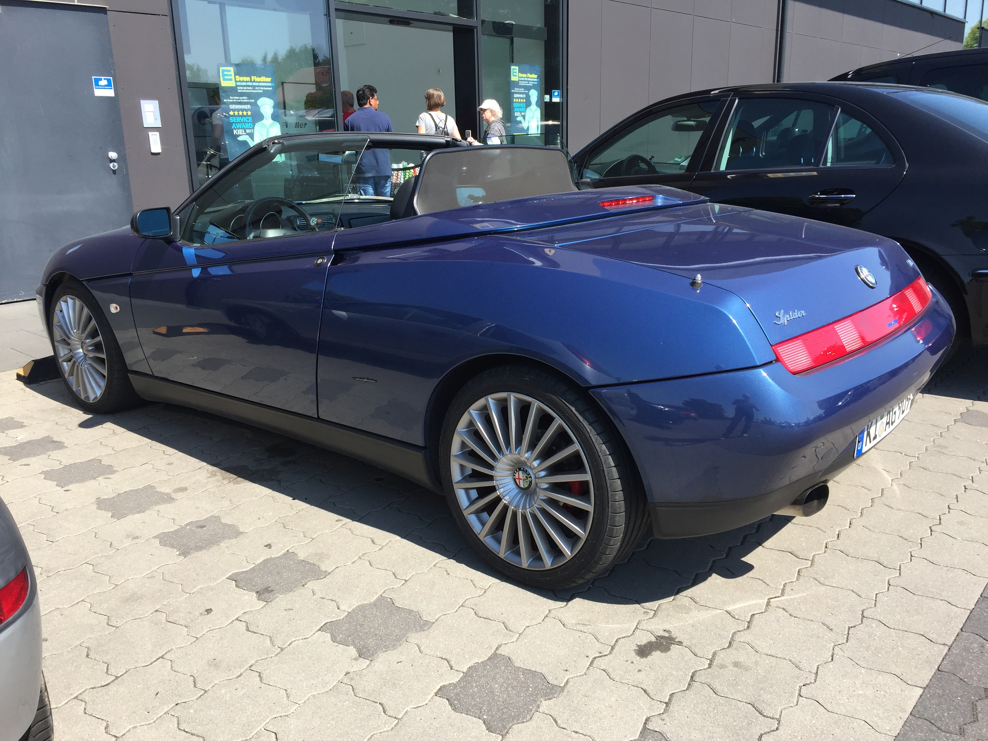 Alfa Romeo Spider V6 offen Heckansicht